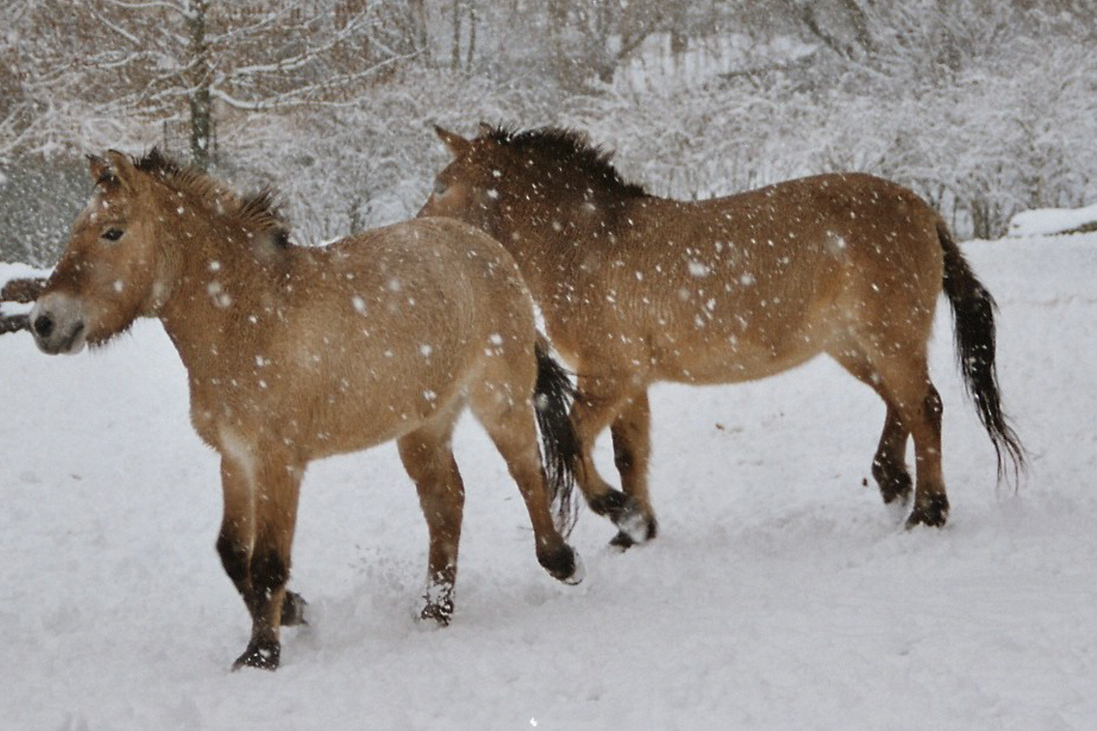 Przewalski-Pferde im Schneetreiben im Kölner Zoo.